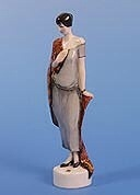 Porzellanskulptur der russischen Schausielerin Anna Achmatowa by Natalja Danko